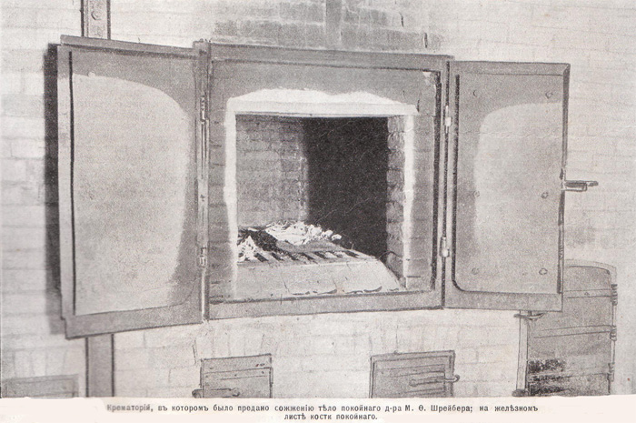 Противочумная лаборатория Форта Александр I. Печь для кремации, в которой было предано кремации тело покойного доктора М. Ф. Шрейбера; на железном листе кости покойного